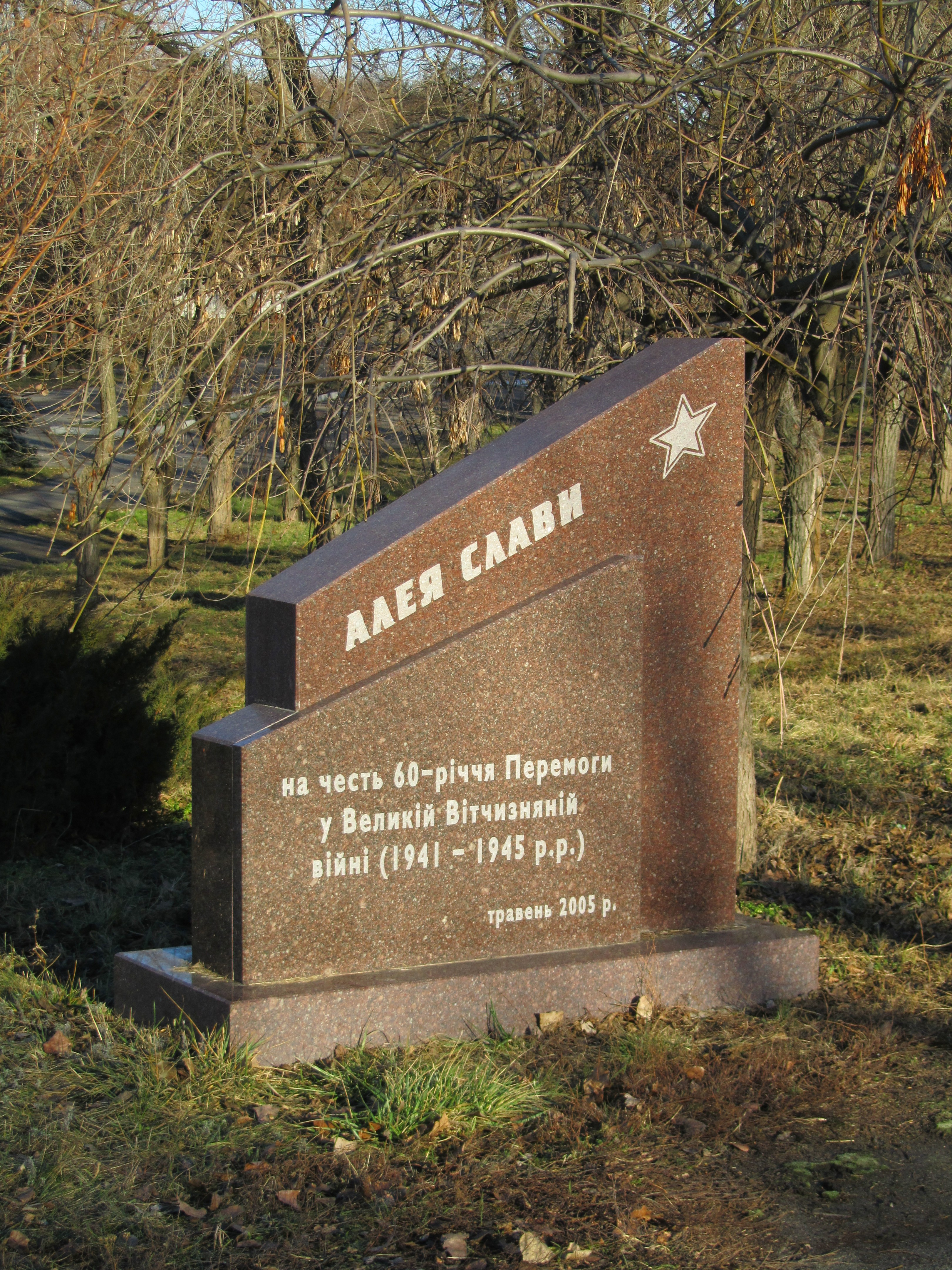 Пам'ятний знак з нагоди закладання Алеї Слави у Ювілейному парку, що у Кременчуці